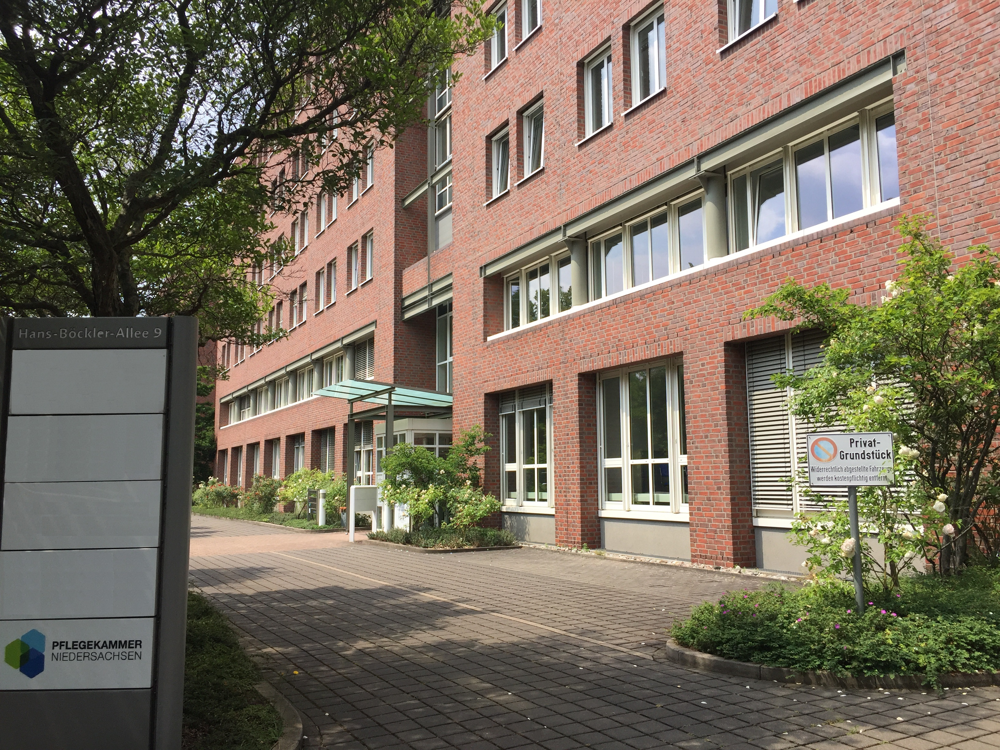 Geschäftsstelle_der_Pflegekammer_Niedersachsen_in_Hannover_am_16_Juni_2020.jpg